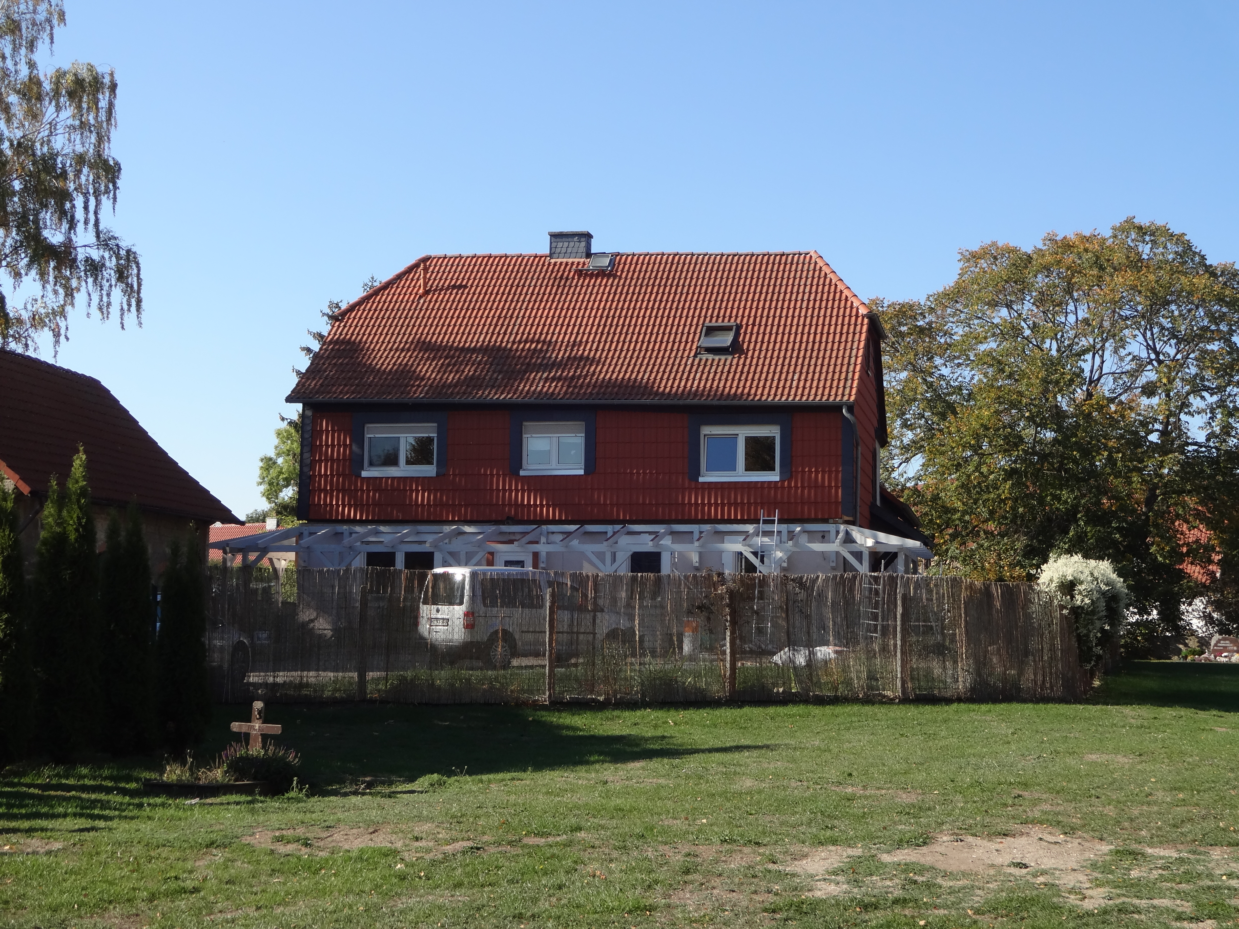 denkmalgeschütztes Bauernhaus in der Kirchstraße 36 in Zilly